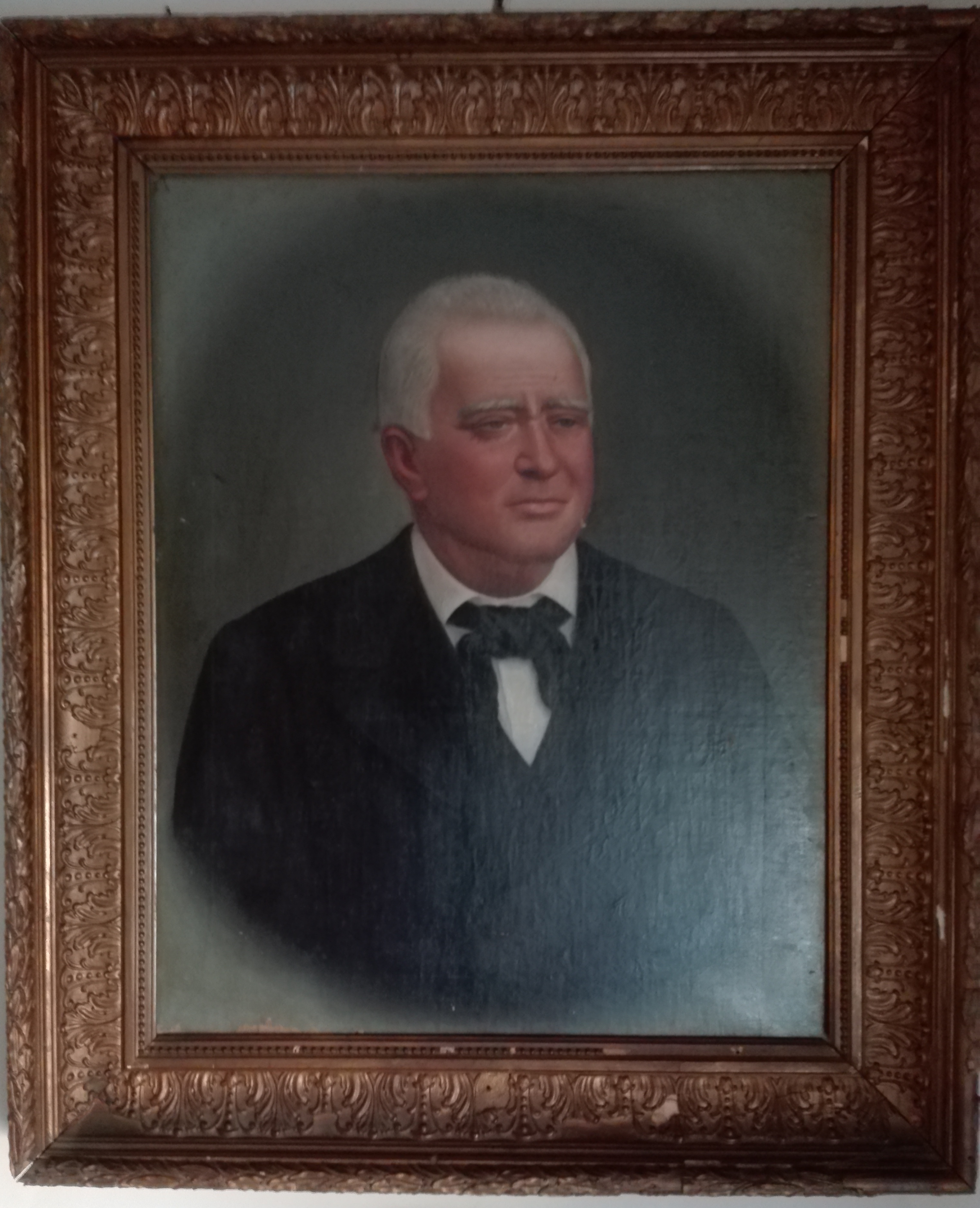 Giovan Giuseppe Colesanti